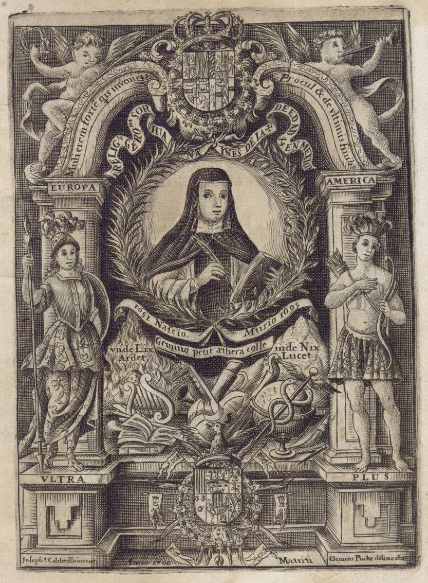 Portada calcográfica con el retrato de sor Juana Inés de la Cruz de Fama y obras posthumas del Fénix de México ... sor Juana Inés de la Cruz, editadas por Juan Ignacio de Castorena y Ursua en Madrid, en la imprenta de Manuel Ruiz de Murga, 1700. Firmada "Joseph. Caldevilla invenit, Clemens Puche delineabat". Madrid, Biblioteca Nacional de España